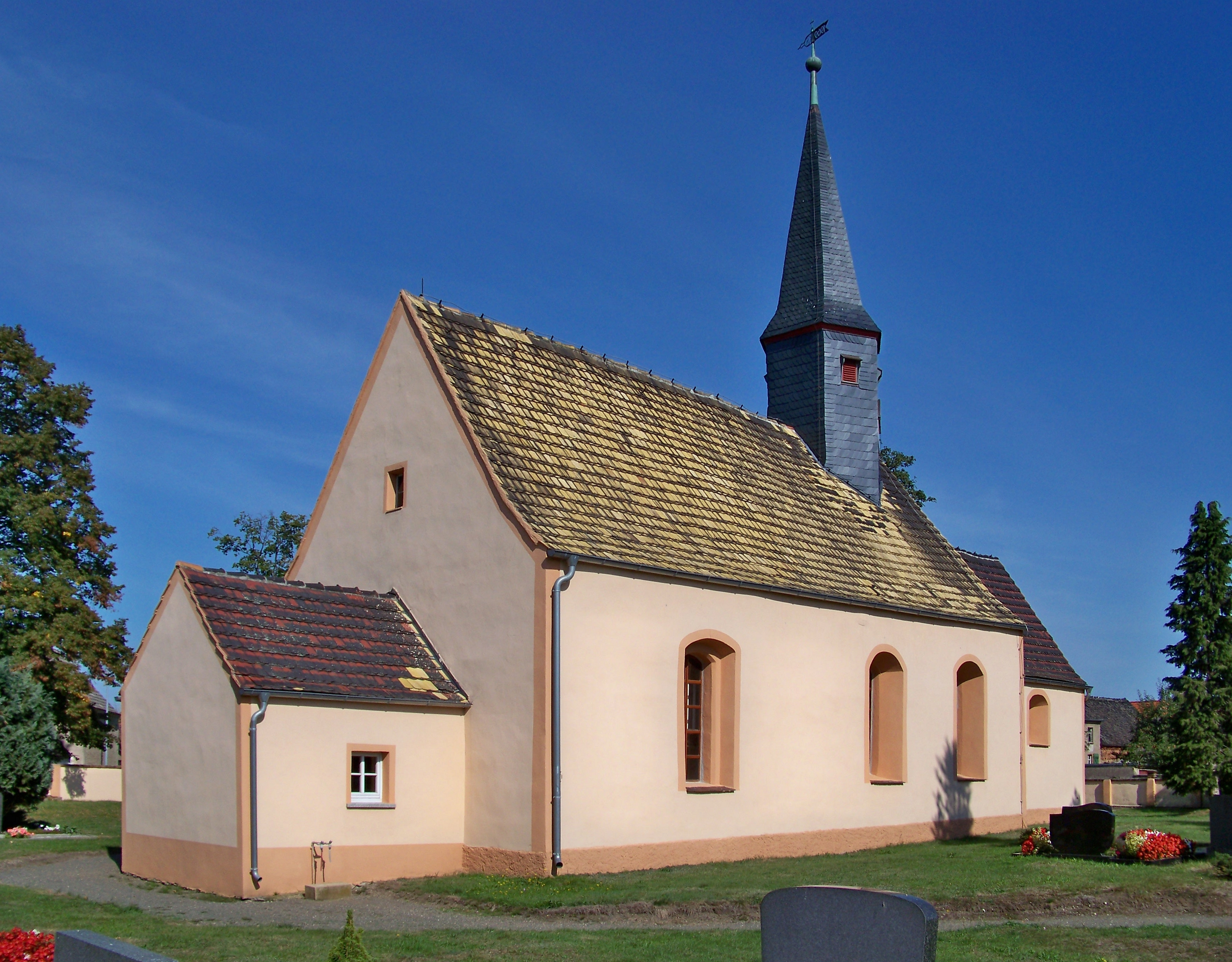 Kirche in Wöllnau/Gemeinde Doberschütz/Sachsen